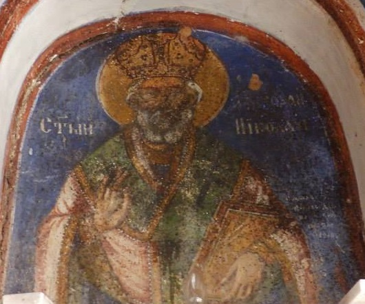 Фреска на Св. Никола во истоимената црква во прилепски Дрен